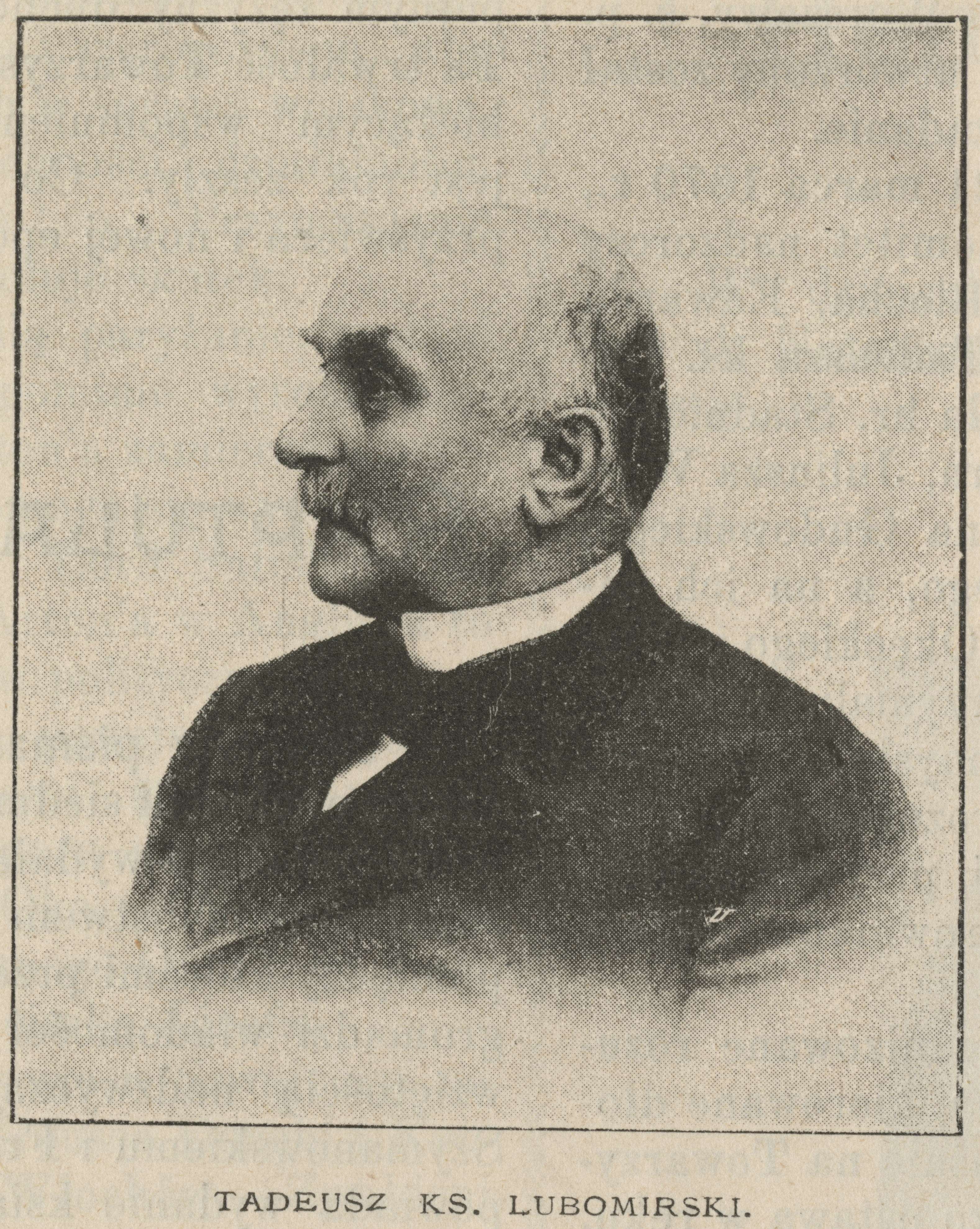 Tadeusz Książę Lubomirski